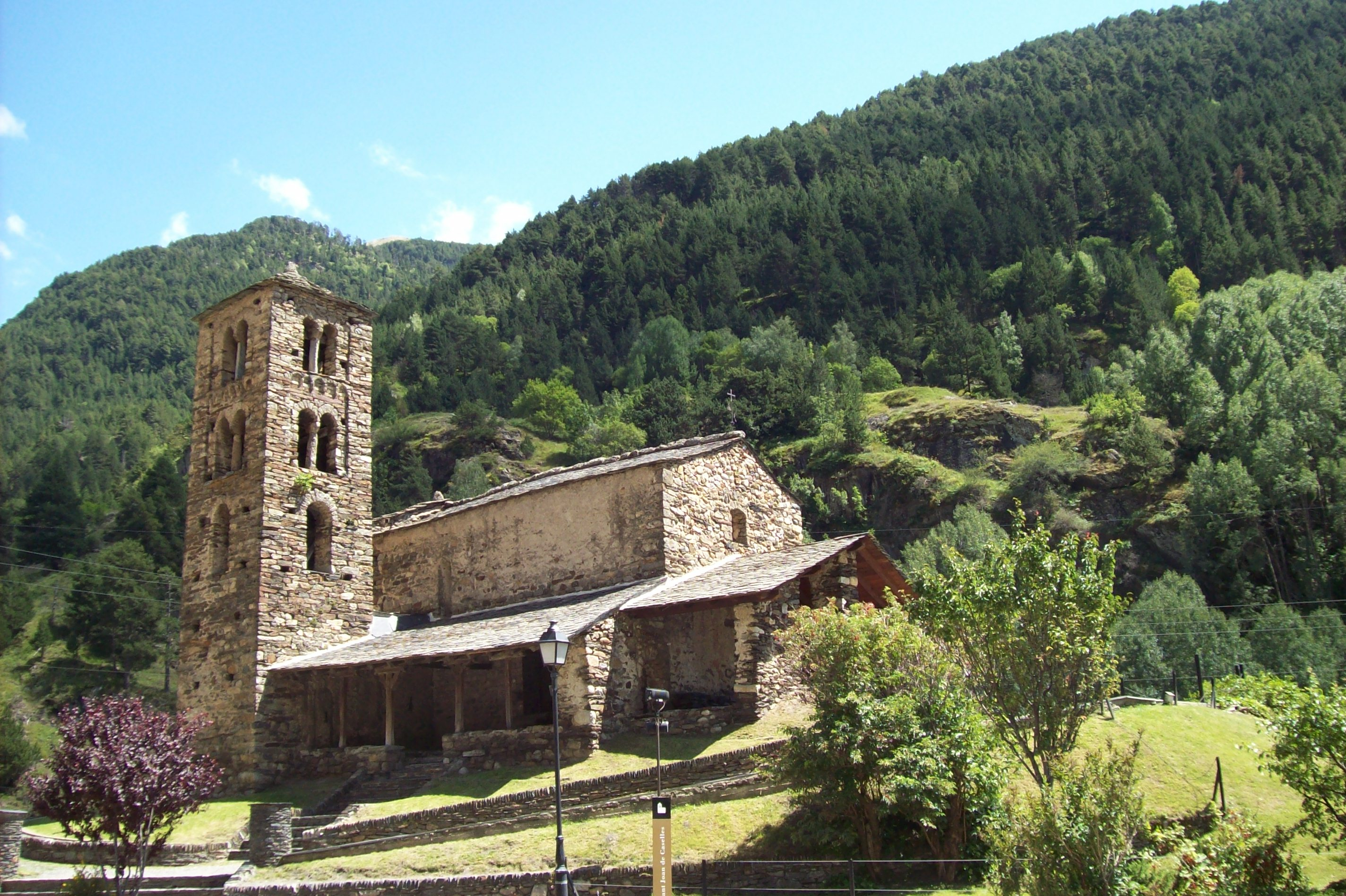 Canillo, Andorra